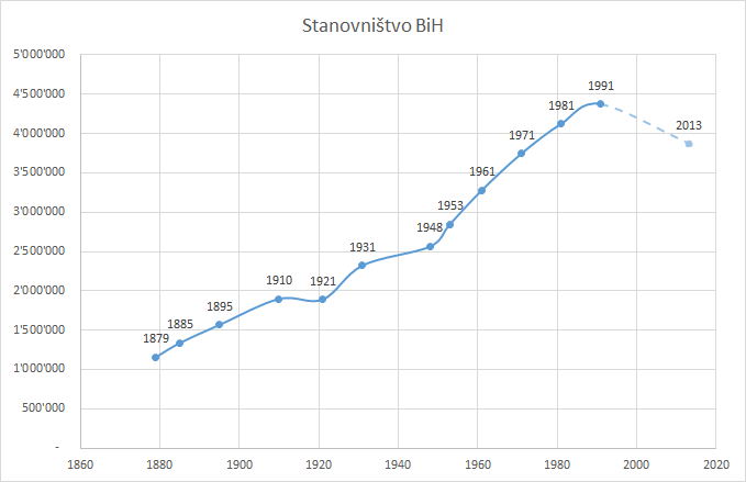 Punktdiagramm der Bevölkerungsentwicklung von Bosnien und Herzegowina